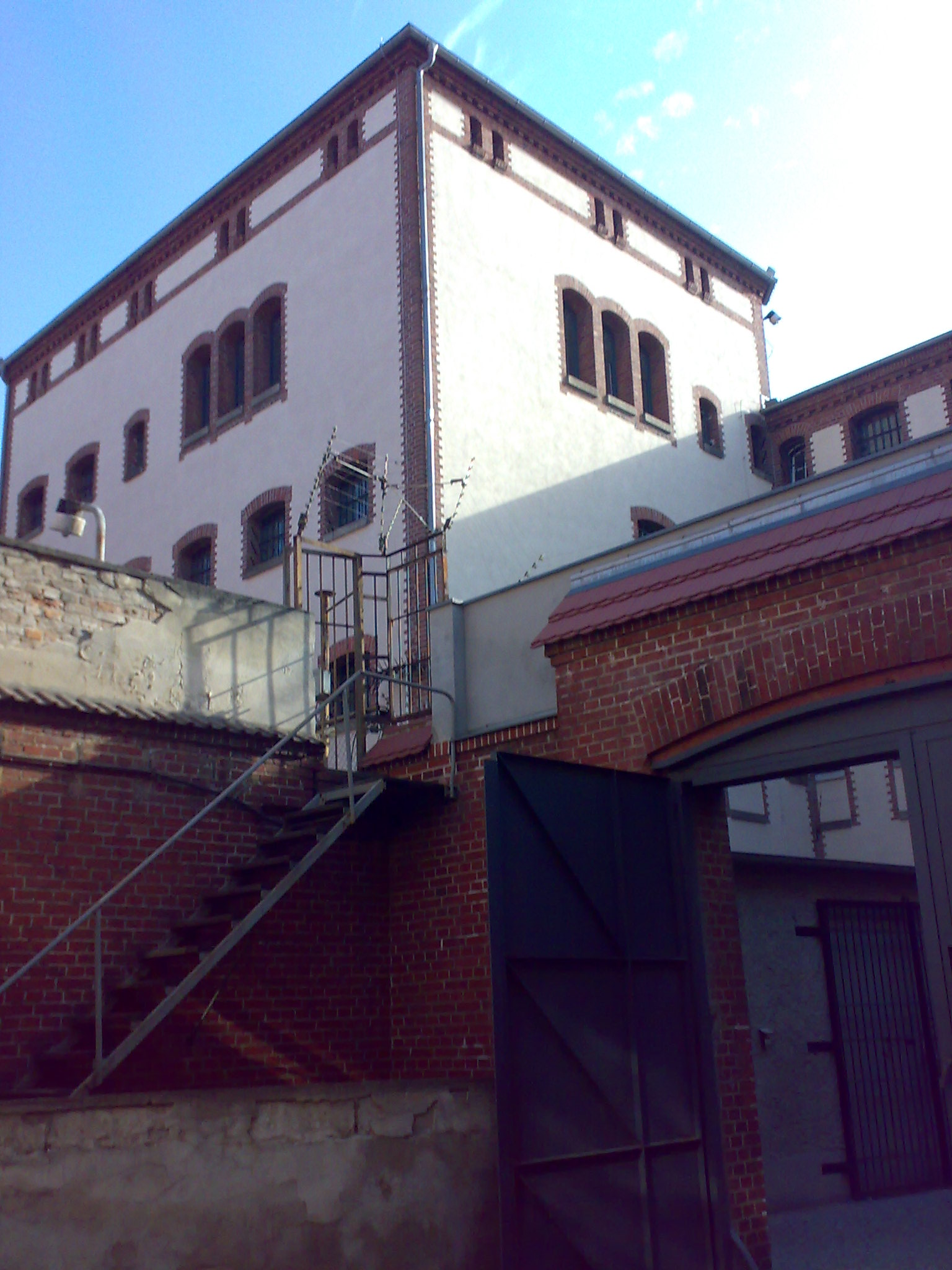 Die heutige Gedenkstätte Lindenstraße 54/55 in Potsdam (das sogenannte "Lindenhotel"), war in der Geschichte Gerichtsgebäude, Sitz eines NS-Erbgesundheitsgerichtes und in der Zeit des Nationalsozialismus, der sowjetischen Bestzungszeit und der DDR Untersuchungsgefängnis (ab 1953 der Stasi). Das Bild zeigt den hinteren Zellentrakt vom Hof aus.